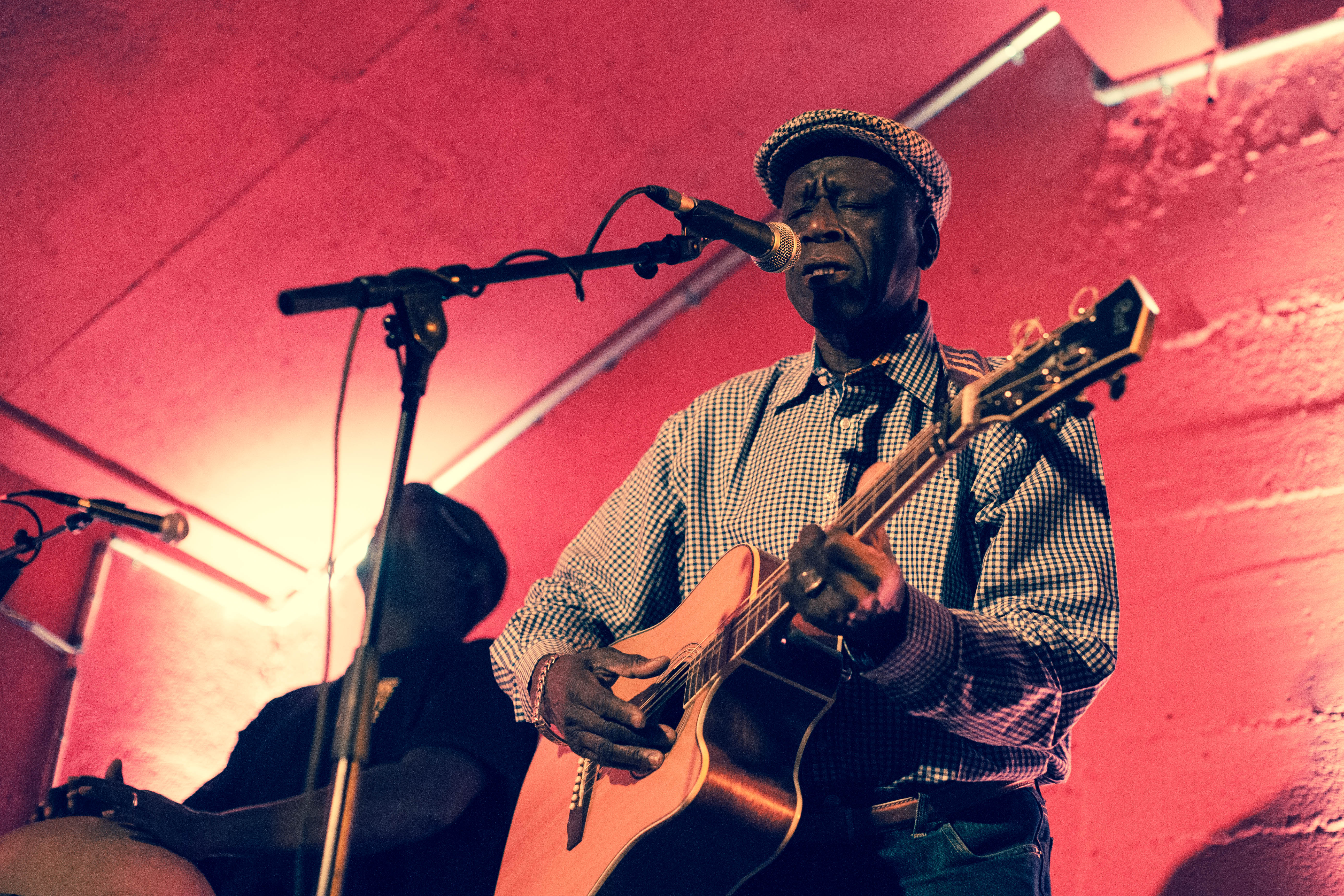 Boubacar Traoré en concert.